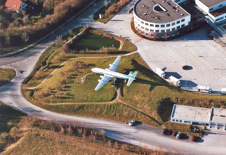 Das Sanicare Flugzeug aus der Vogelperspektive.